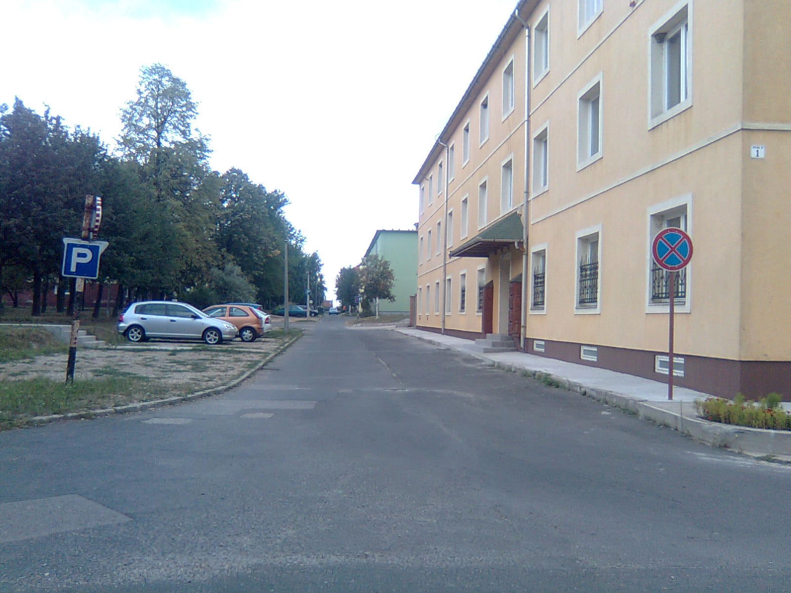 Arany János Utca